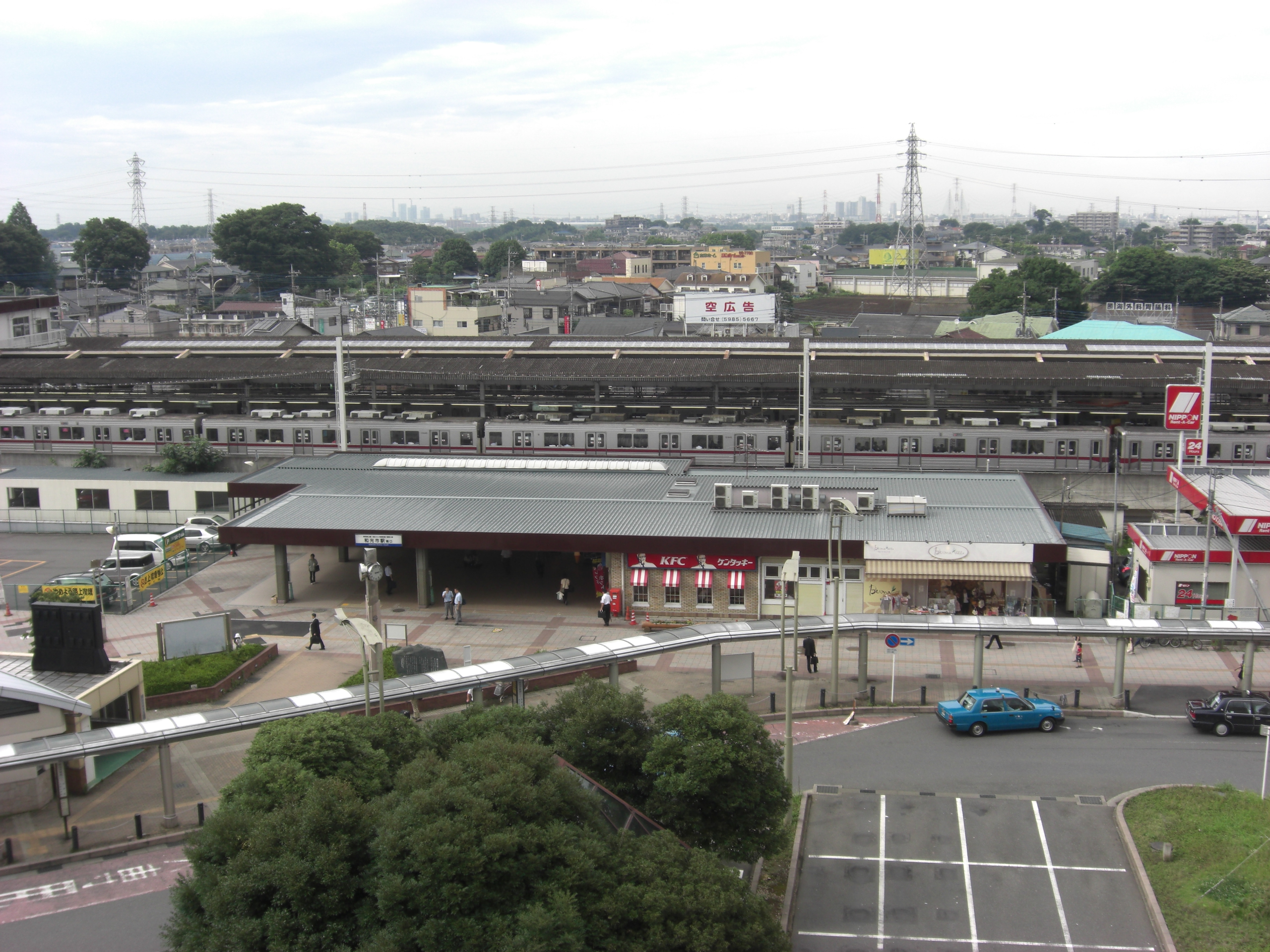 和光市駅南口全景